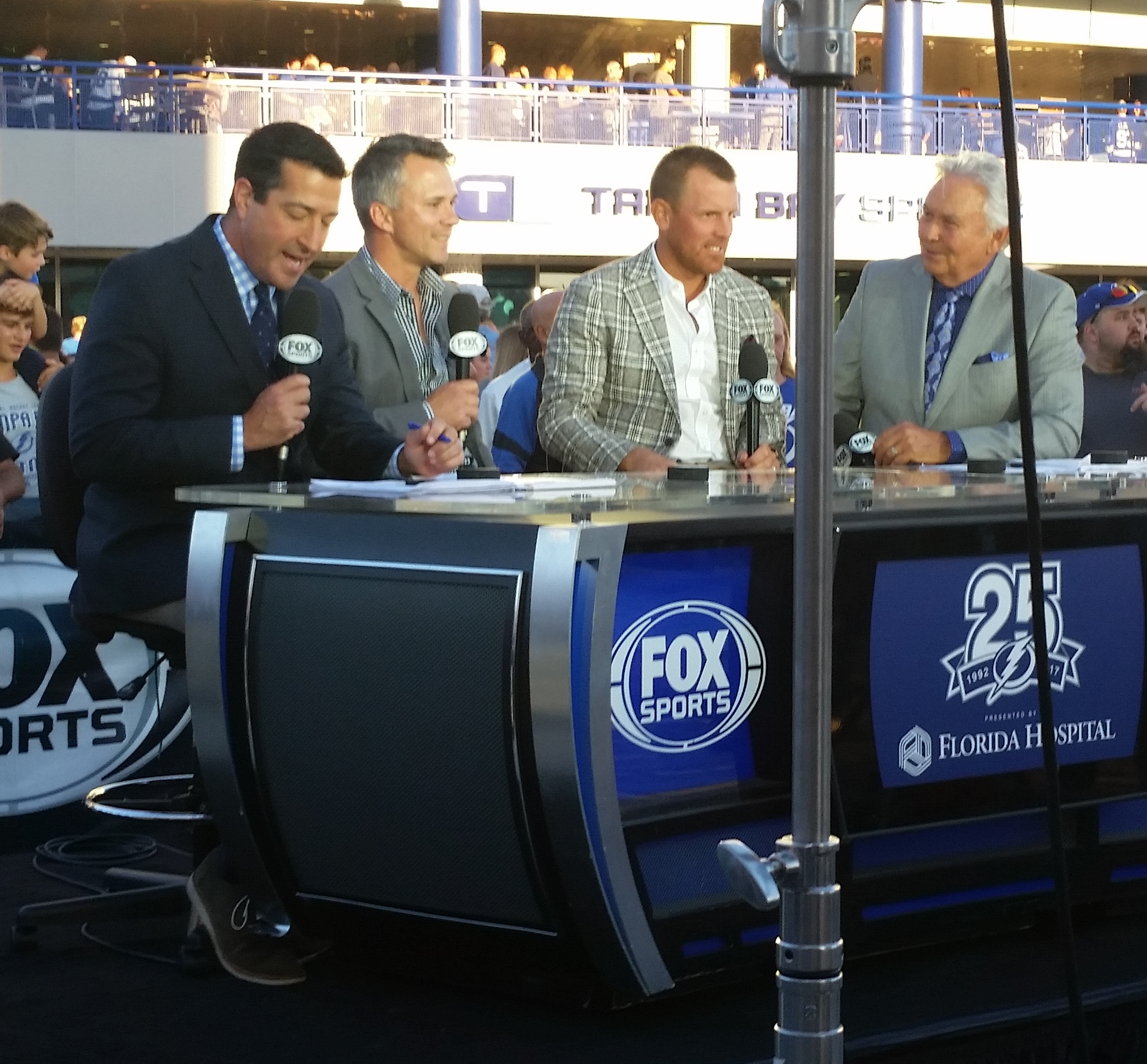 Amalie Arena 401 Channelside Dr, Tampa, FL 33602 US